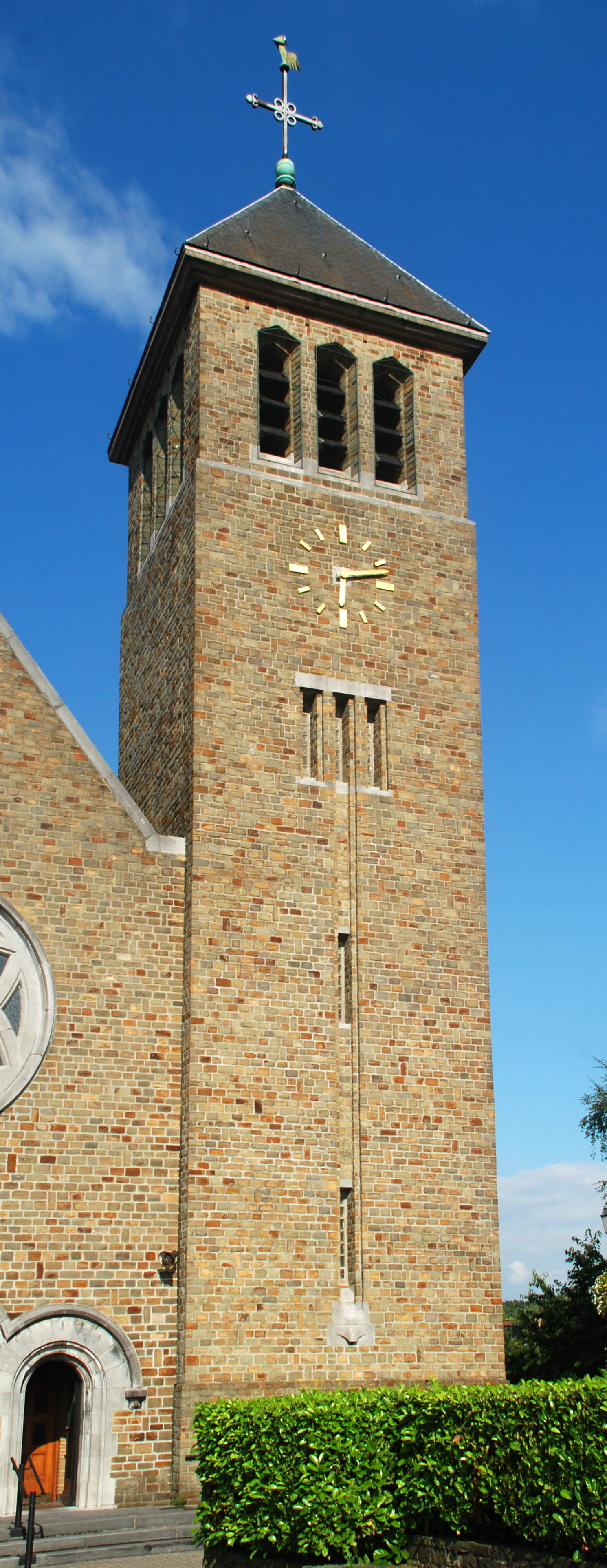 Belgique - Babant wallon - Ottignies - Eglise Saint-Géry de Limelette (néo-roman 1955)